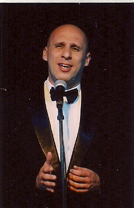 "ז'אק" - גיל אלון שר ואומר ז'אק ברל